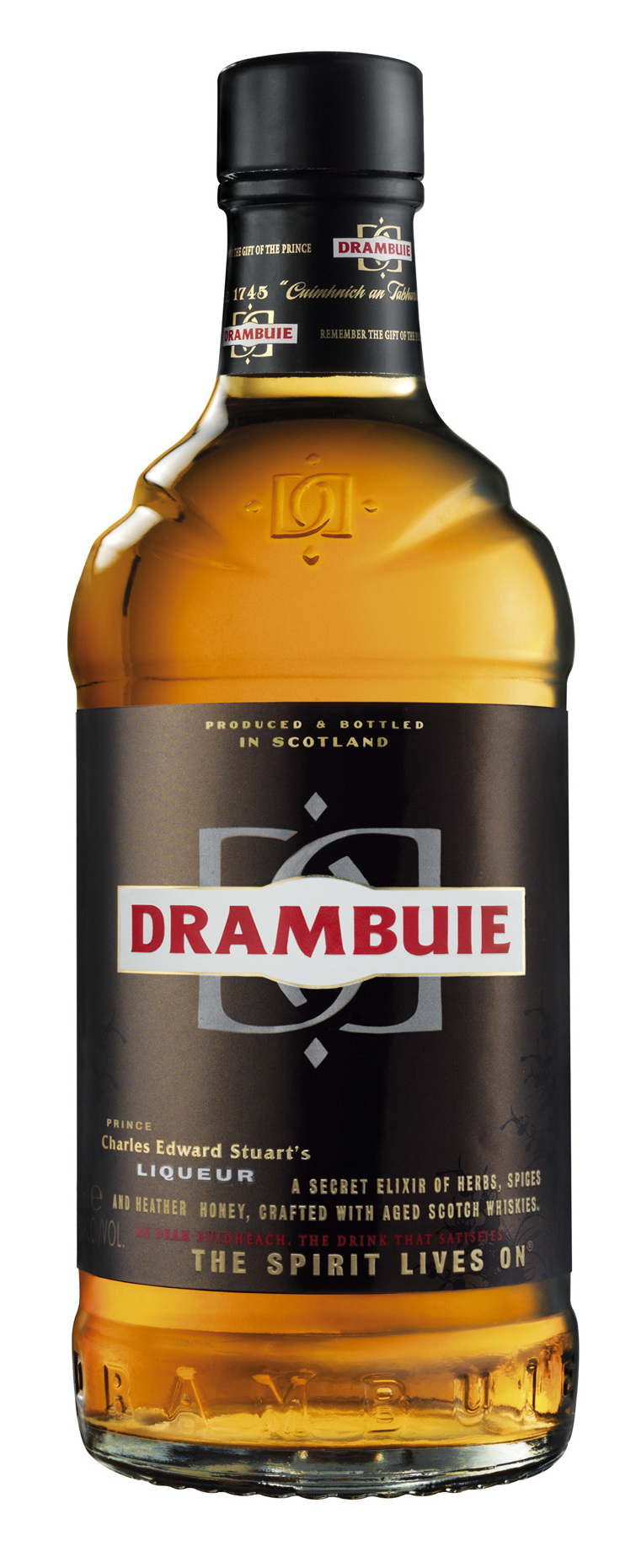 [Drambuie Bottle]